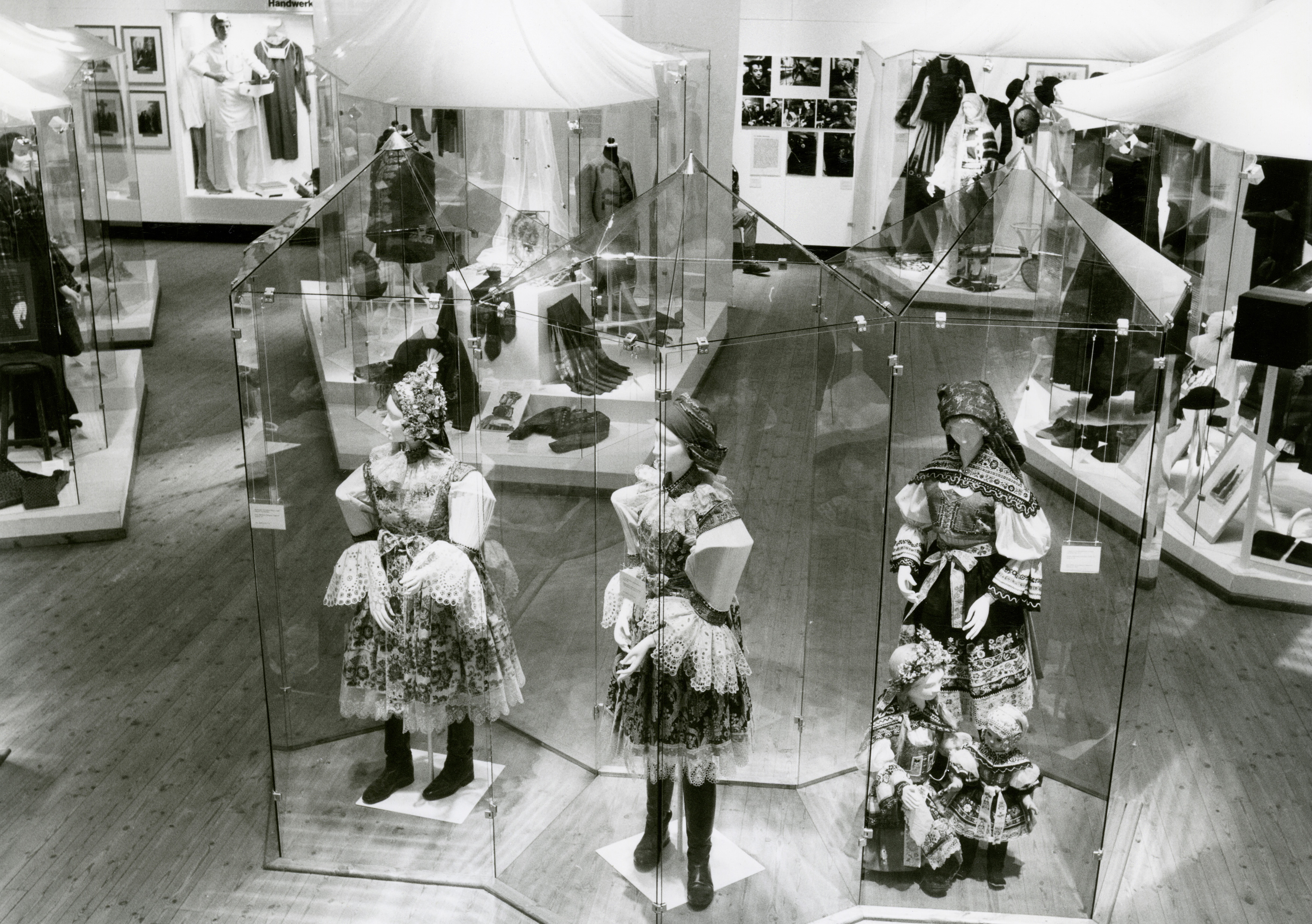 Blick in die Ausstellung „Weiße Westen – Rote Roben. Von den Farbordnungen des Mittelalters zum individuellen Farbgeschmack“, die vom Museum für Völkerkunde, Abt. Europa und dem Museum für Deutsche Volkskunde zwischen dem 10.12.1983 und dem 11.3.1984 im Museum Dahlem, Lansstr. 8, veranstaltet wurde. GLAM-on-Tour: Wiki goes MEK! 2.0 Wikipedianer fotografierten vom 16. bis 18. November 2018 im Museum Europäischer Kulturen. This photo was taken during a project supported by WMDE. Gefördert von / Supported by: Wikimedia Deutschland, Museum Europäischer Kulturen